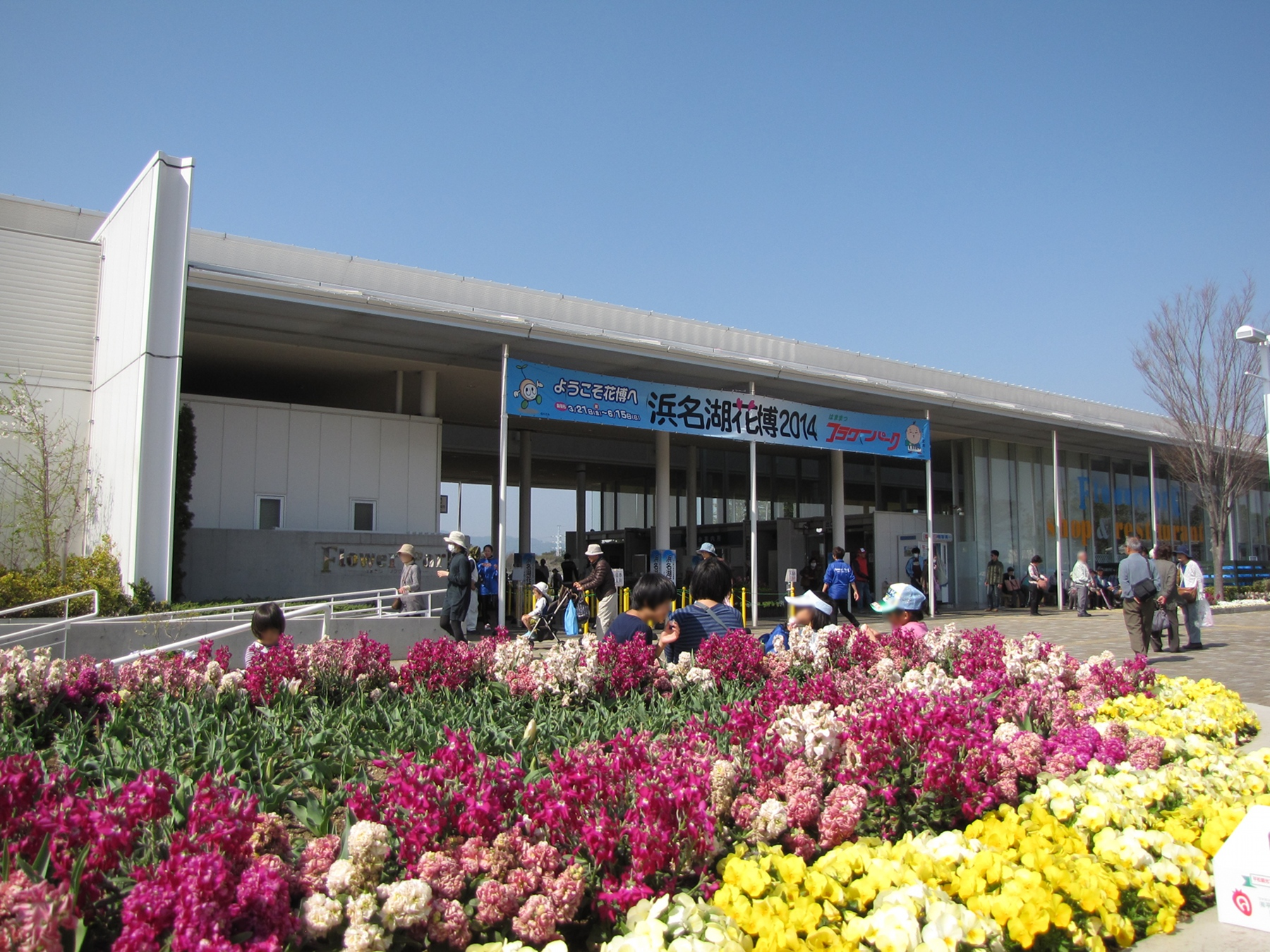 浜名湖花博2014のはままつフラワーパーク会場正面ゲート